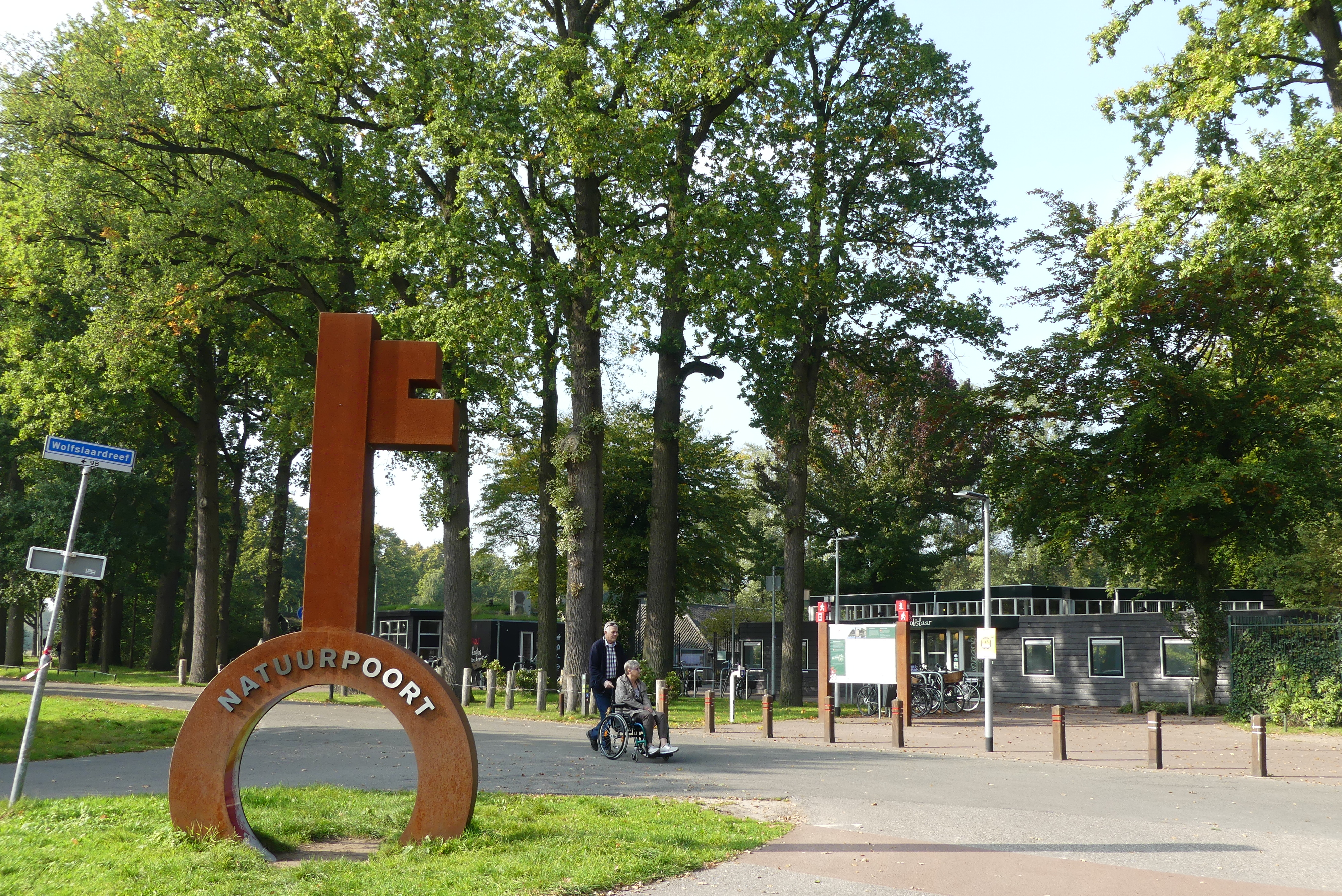 Zicht op een deel van de natuurpoort Wolfslaar met informatiecentrum en kinderboerderij gevestigd aan de Wolfslaarsdreef 95 in Breda. Gelegen nabij de wijk de IJpelaar in het zuiden van Breda